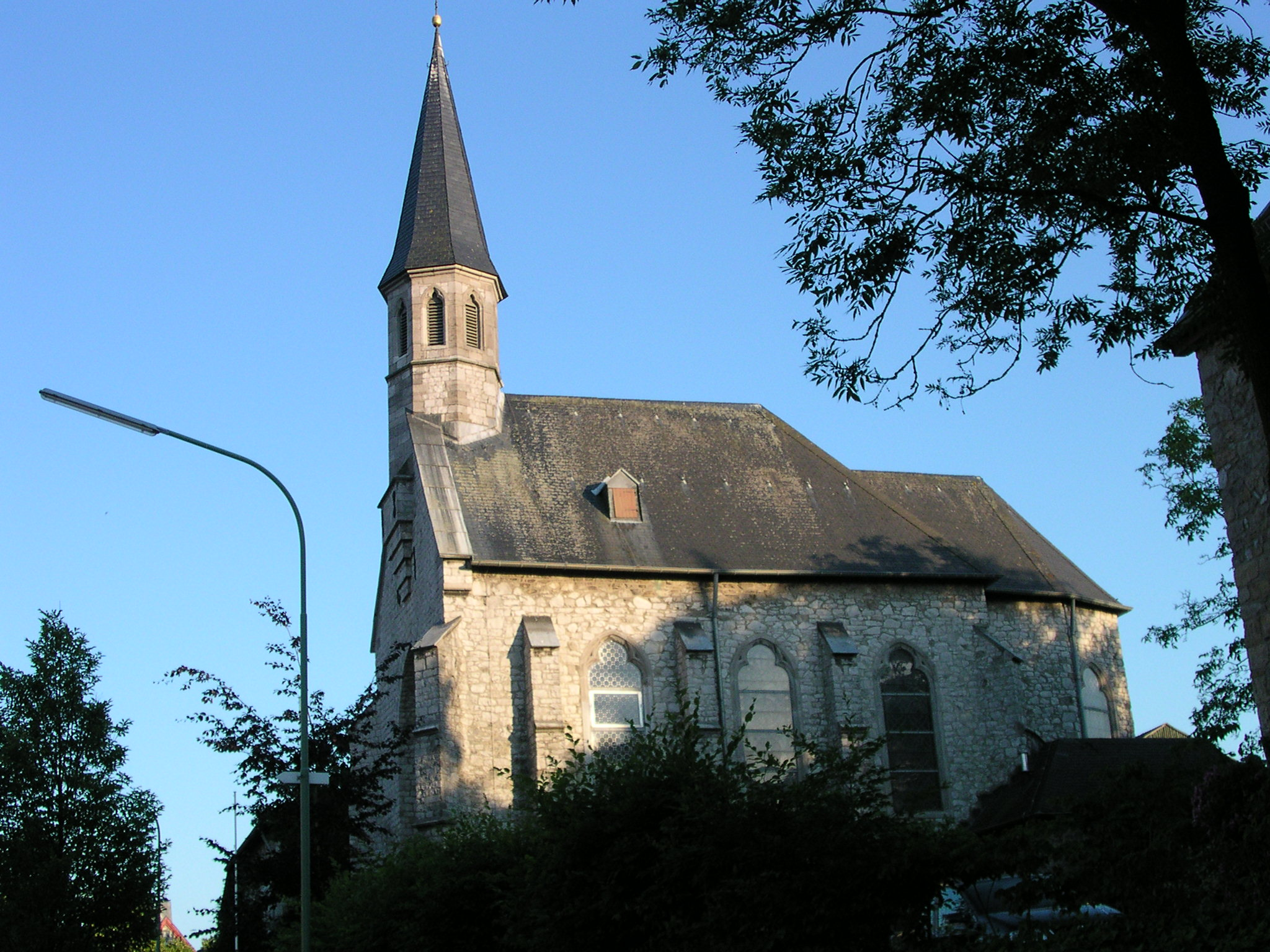 Stolberg Dorff, rk. Kirche St. Maria Empfängnis